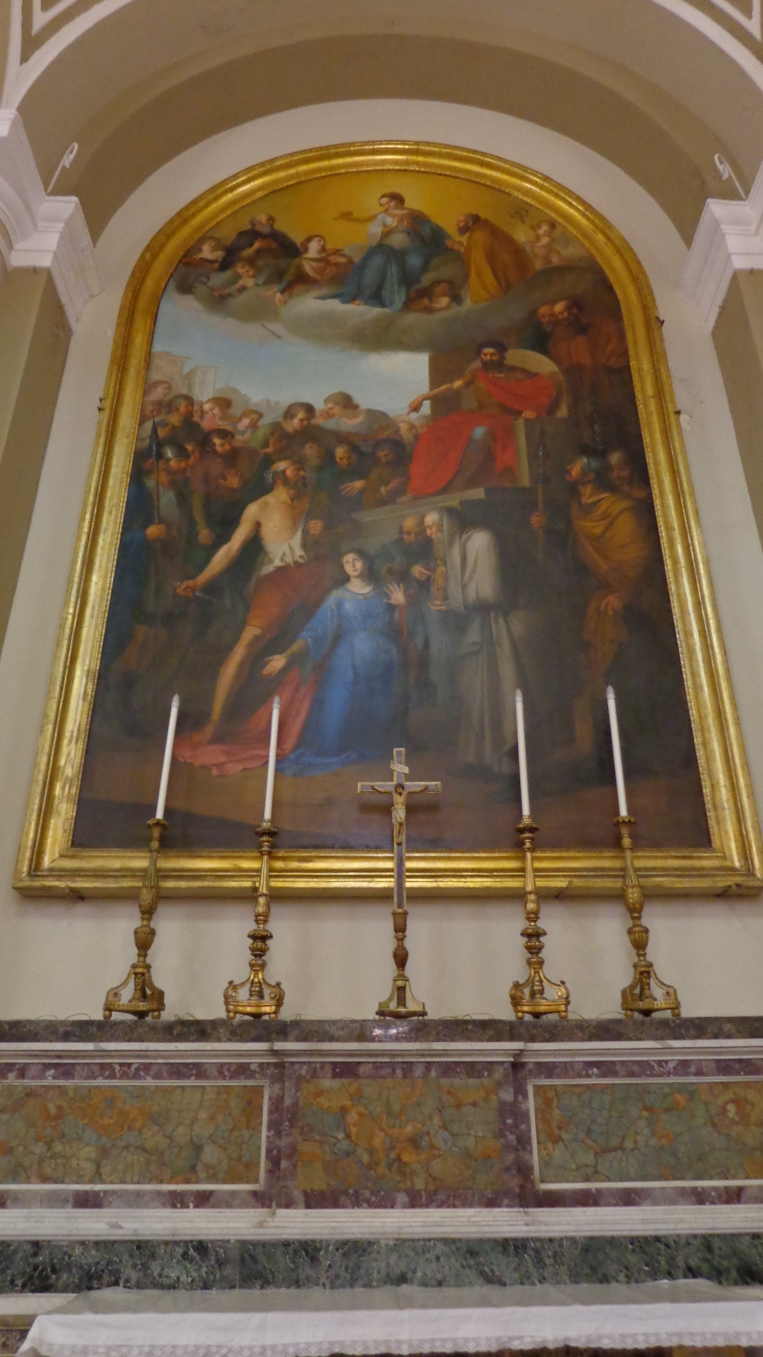 Martirio e apoteosi di Sant'Agata, opera dei fratelli calatini Francesco e Giuseppe Vaccaro, duomo di Sant'Isidoro Agricola di Giarre.